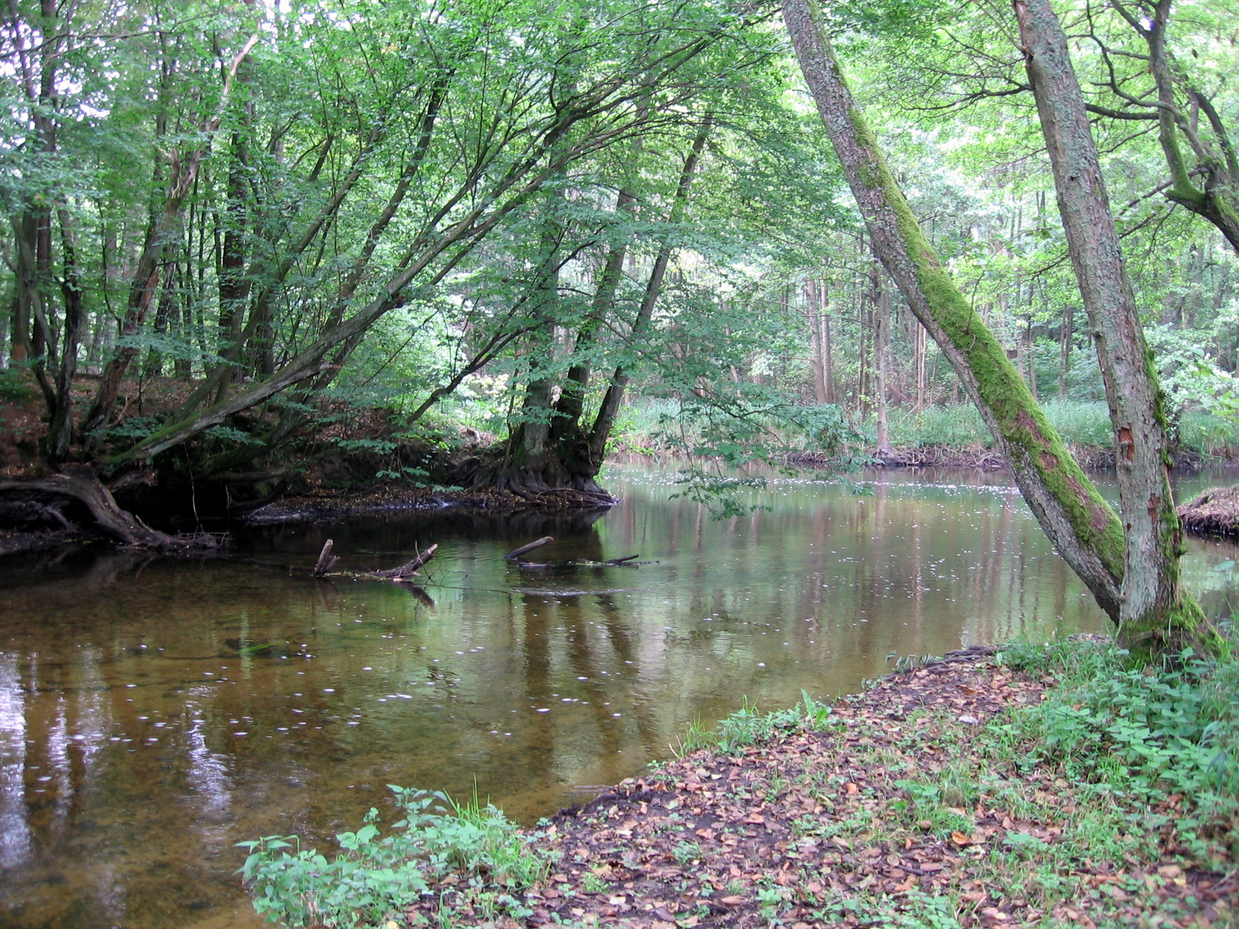 Ujście Korytnicy do Drawy k. Bogdanki